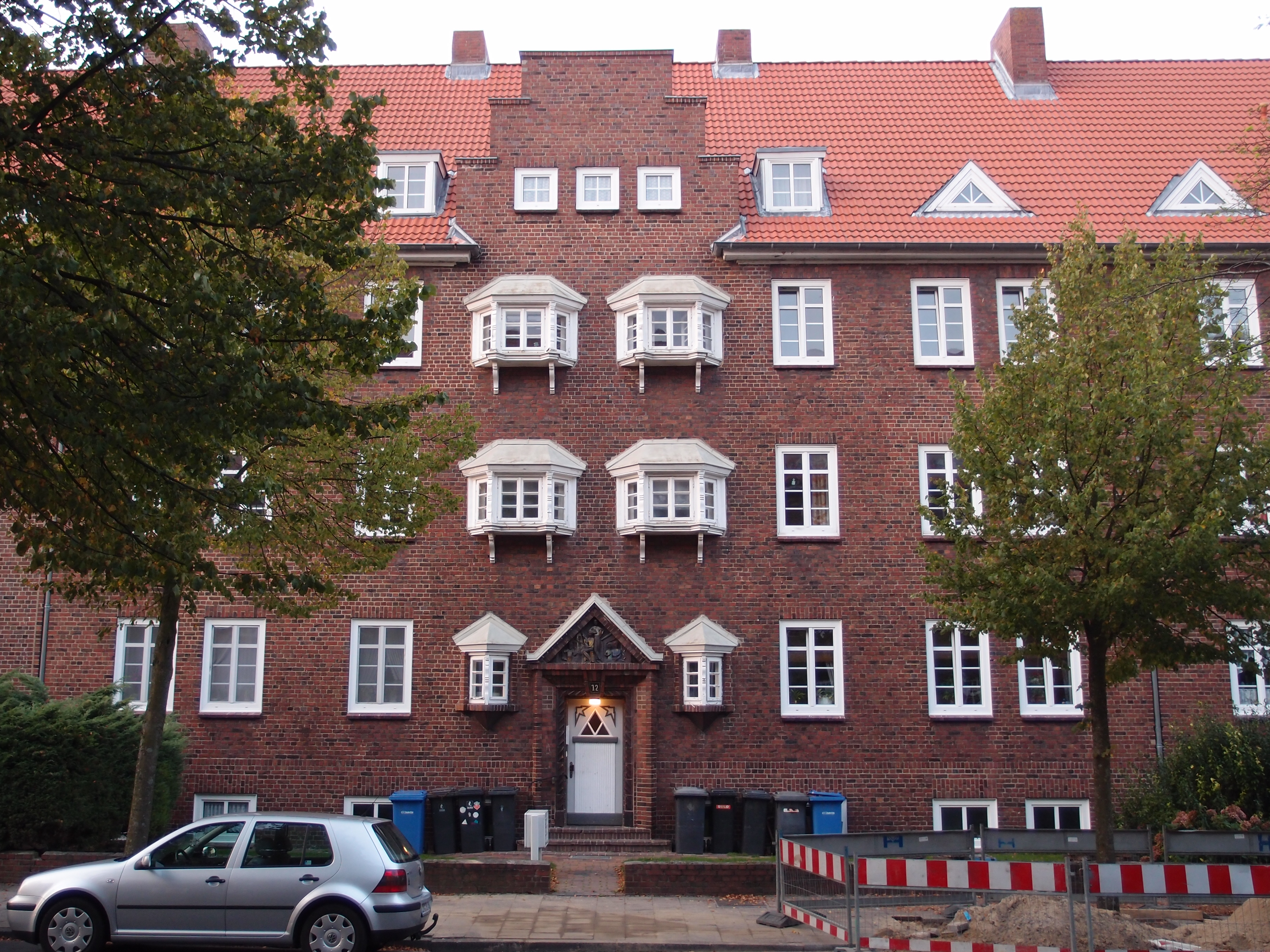 Cuxhaven, Gorch-Fock-Straße 12, Straßenansicht. Ensemble.